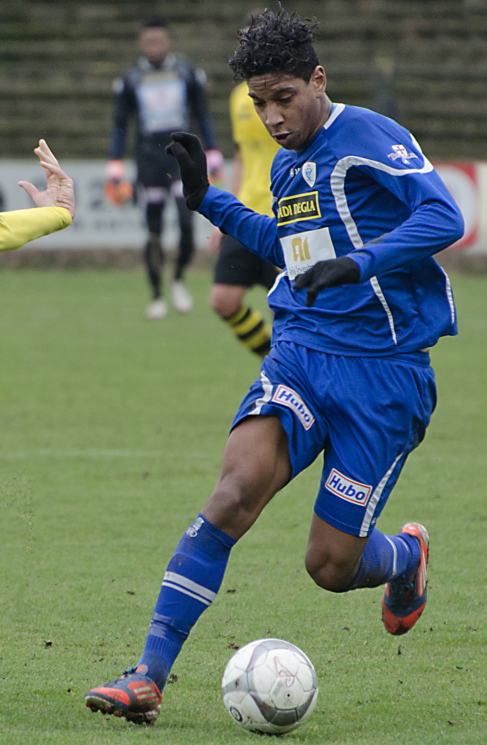 Alandson Jansen Da Silva